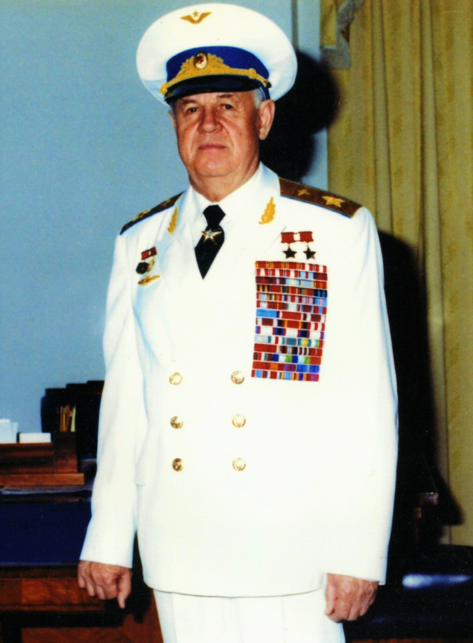 Маршал авиации дважды Герой Светского Союза Александр Николаевич Ефимов